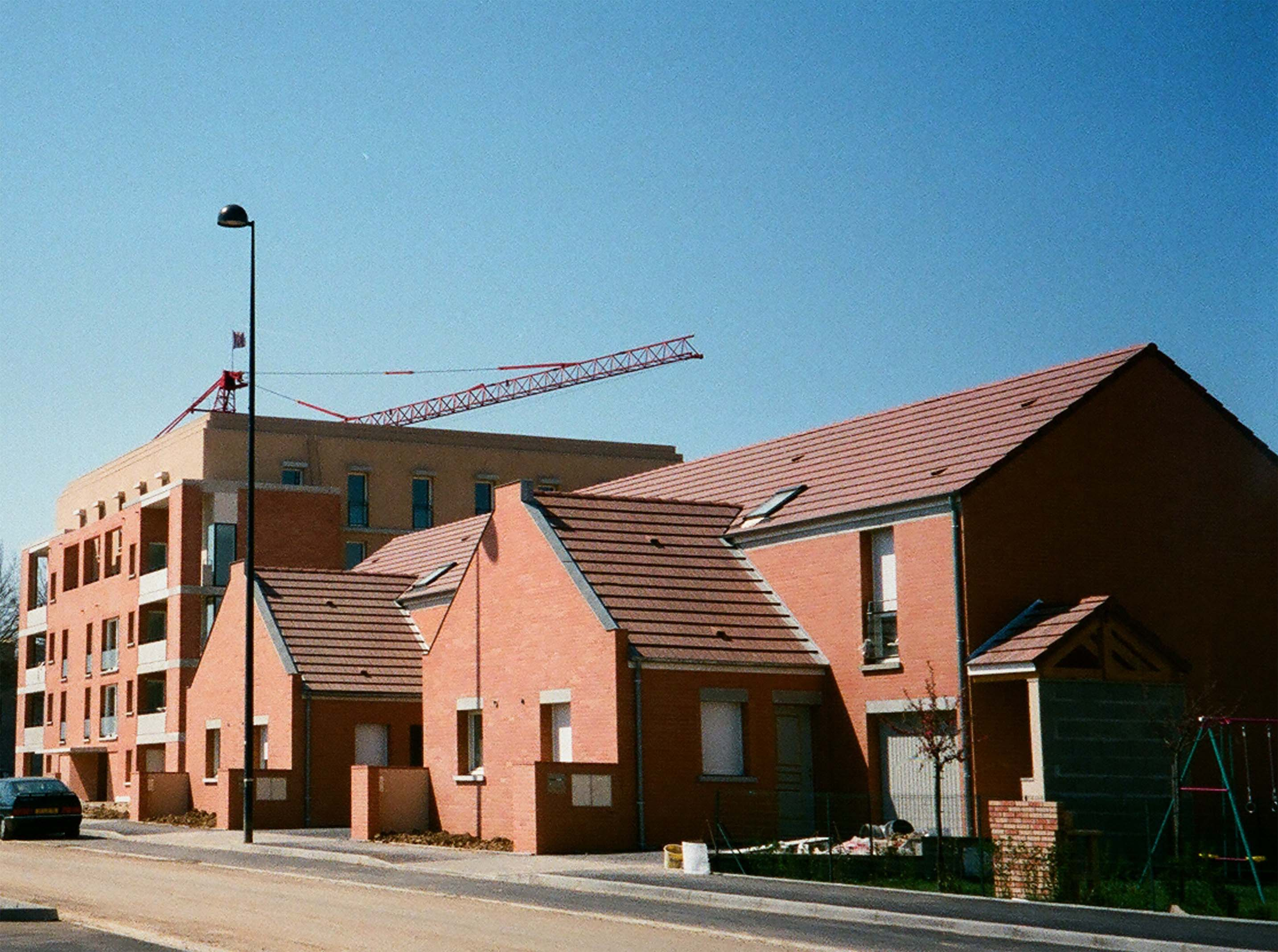 Dzielnica mieszkaniowa Elancourt, Francja